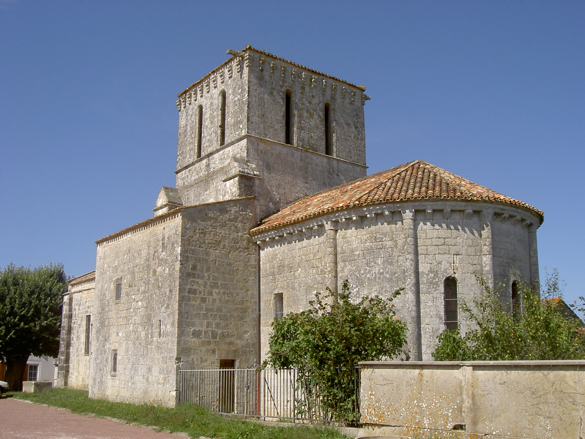 Photo de l'église de Lussant (Charente-Maritime) prise le fr:2004